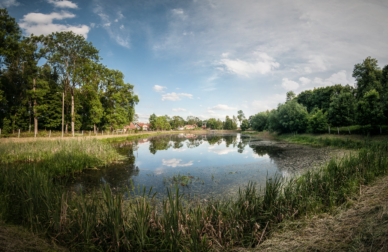 Staw w Dobrocinie na północ od drogi 519.